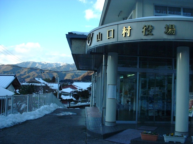 旧・山口村役場 撮影時は長野県